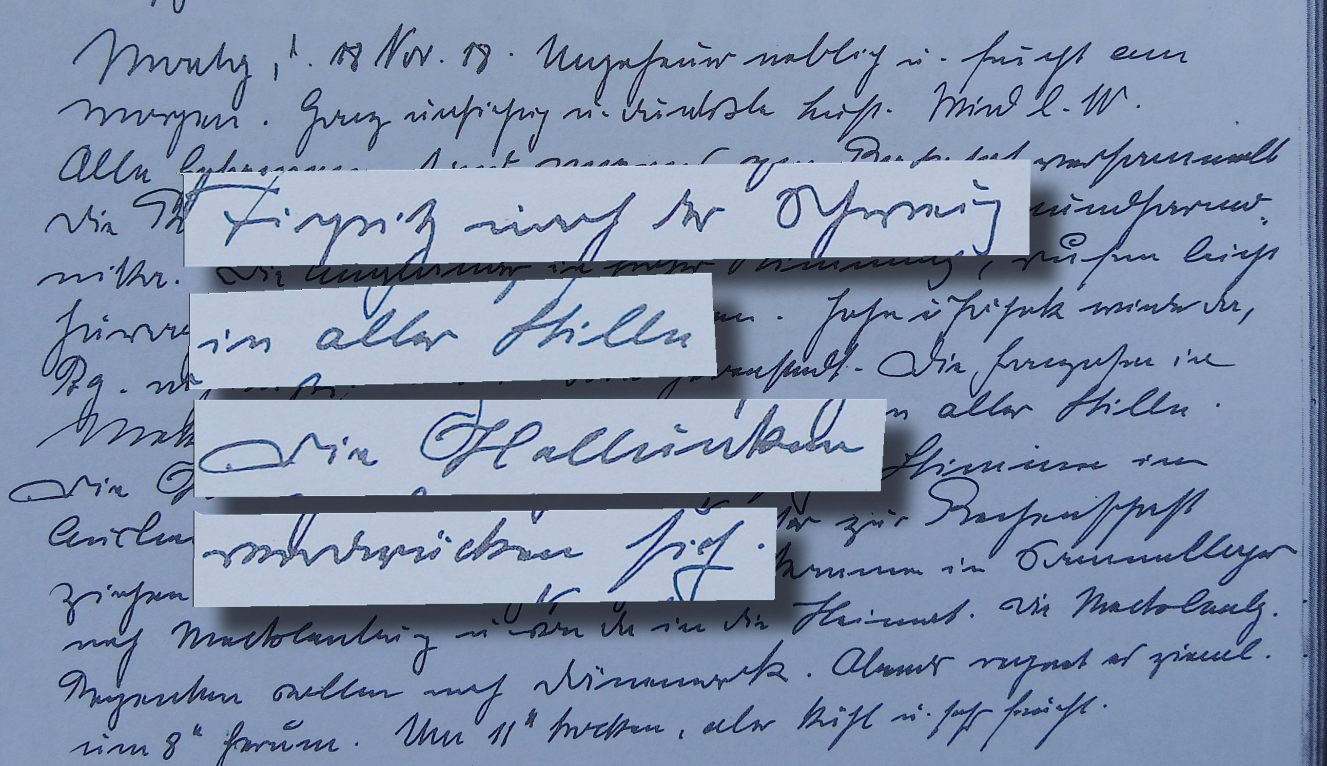 Text aus dem Tagebuch von Andersen: Tirpitz nach der Schweiz in aller Stille. Die Hallunken verdrücken sich.